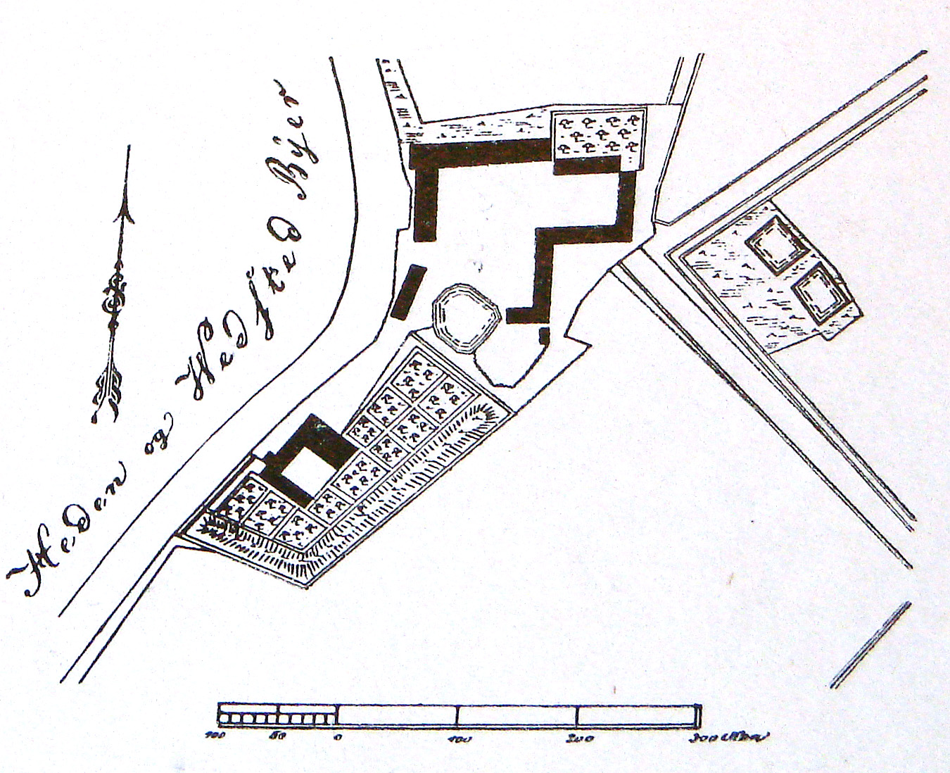 Birkelse beliggenhedsplan cirka 1800.